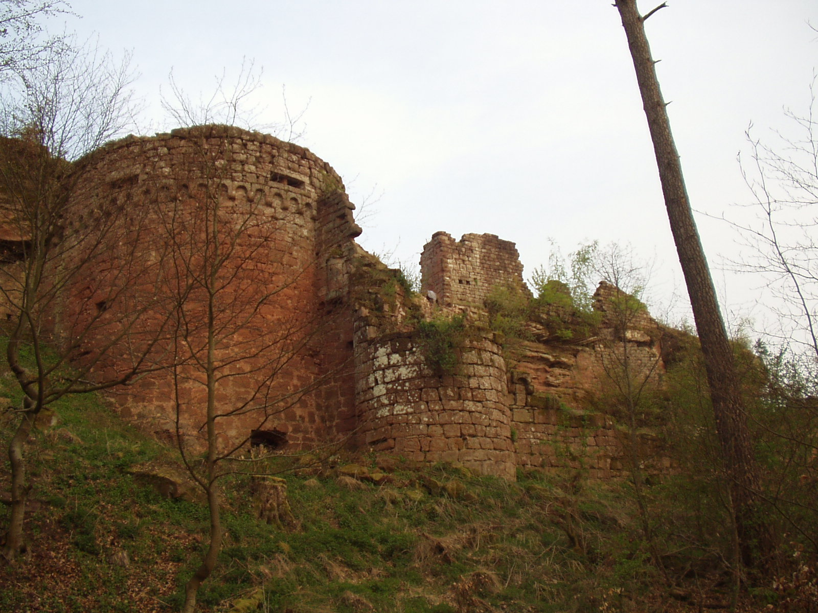 Burg Schöneck, Reste der Außenmauer